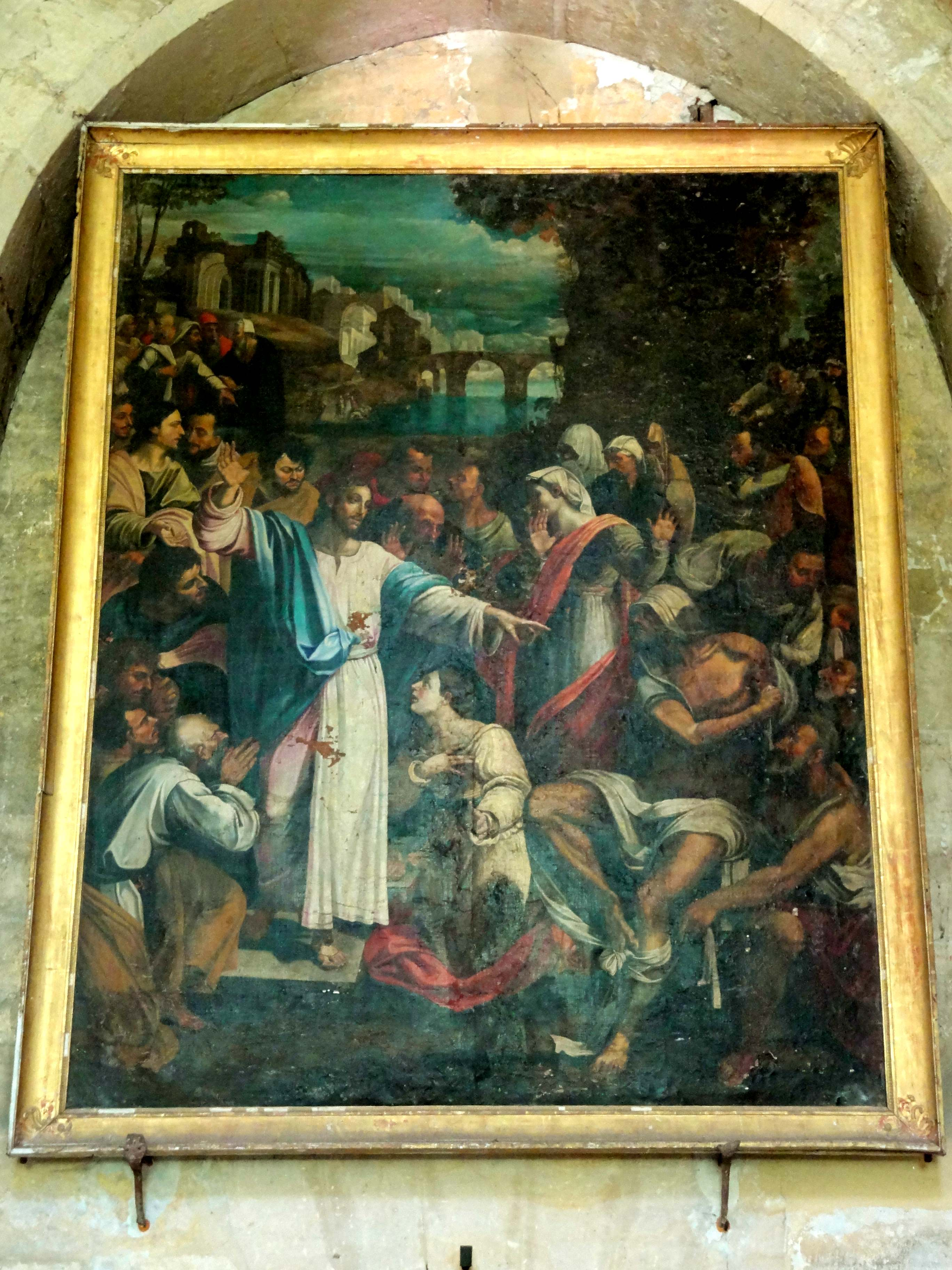 Bas-côté sud, 2e travée, tableau - Résurrection de Lazare. Copie anonyme d'après Sebastiano del Piombo.